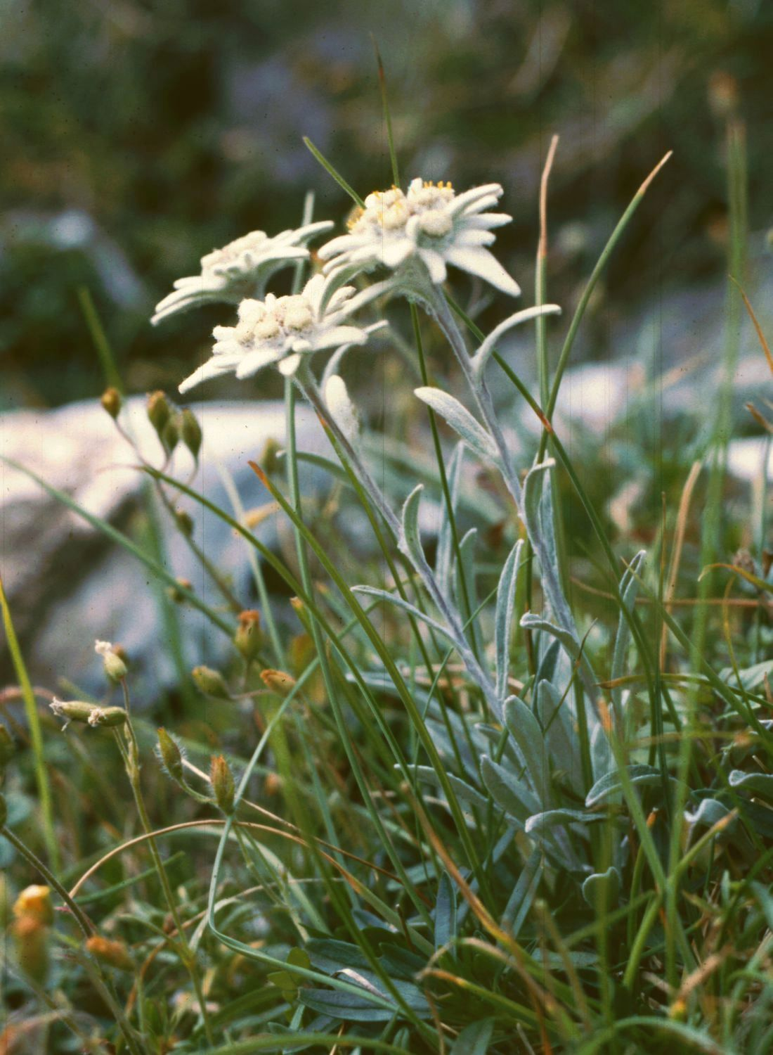 Edelweiß Leontopodium alpinum, Korbblütengewächse (Asteraceae) - Rumänien/România: Südkarpaten, Retezatgebirge, Piatra Iorgovanului, Kalk, ca. 1800 m Seehöhe